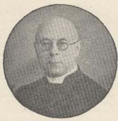 Priester Louis Colens - Brugge - West-Vlaanderen - Belgium